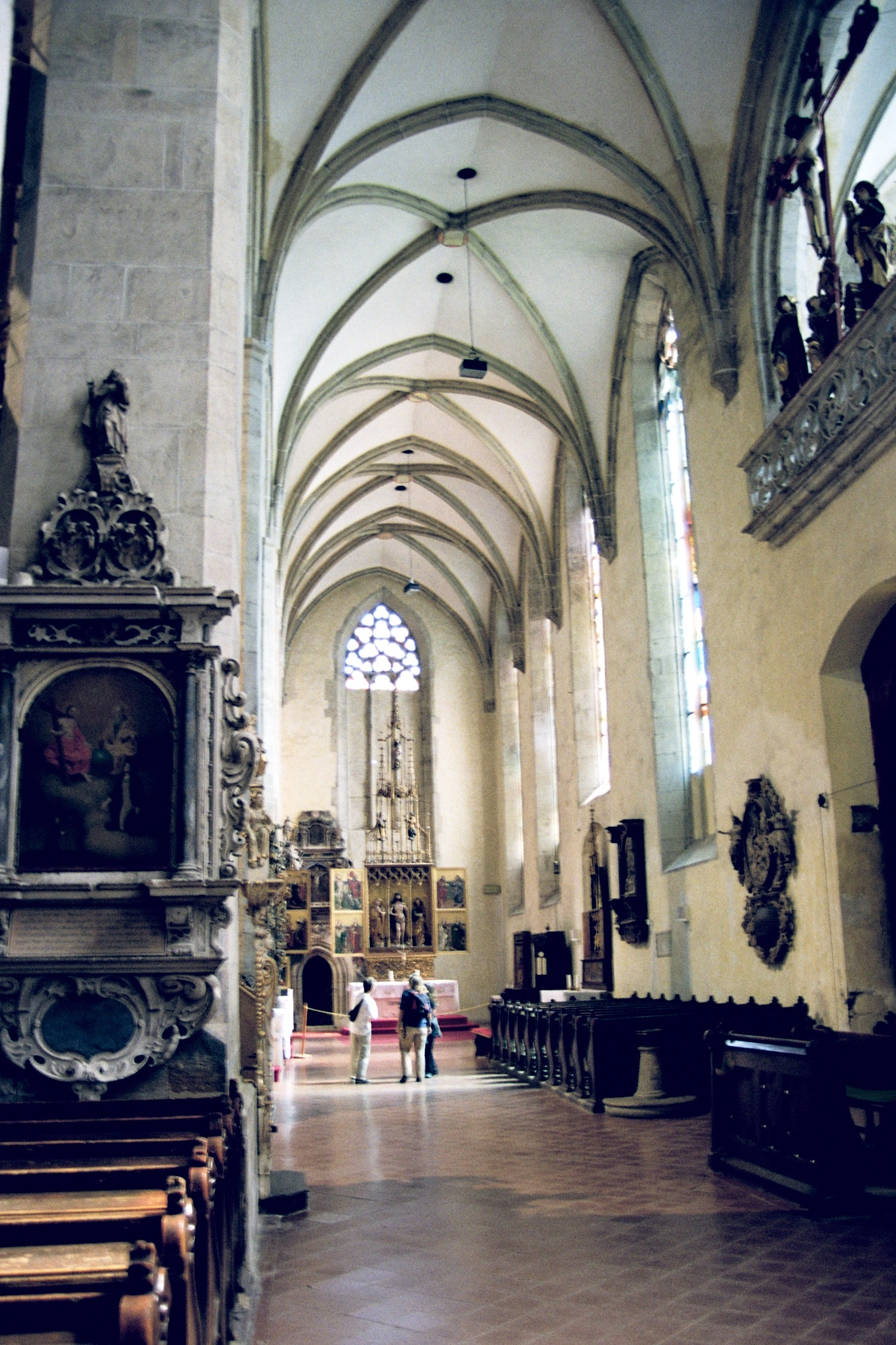 Kościół św. Jakuba w Lewoczy - Oratorium Korwinowskie